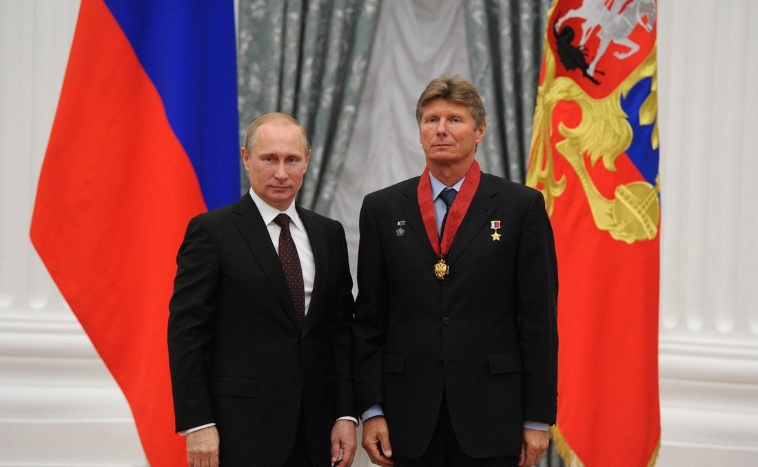 Орденом «За заслуги перед Отечеством» II степени награждён инструктор – космонавт-испытатель Геннадий Падалка